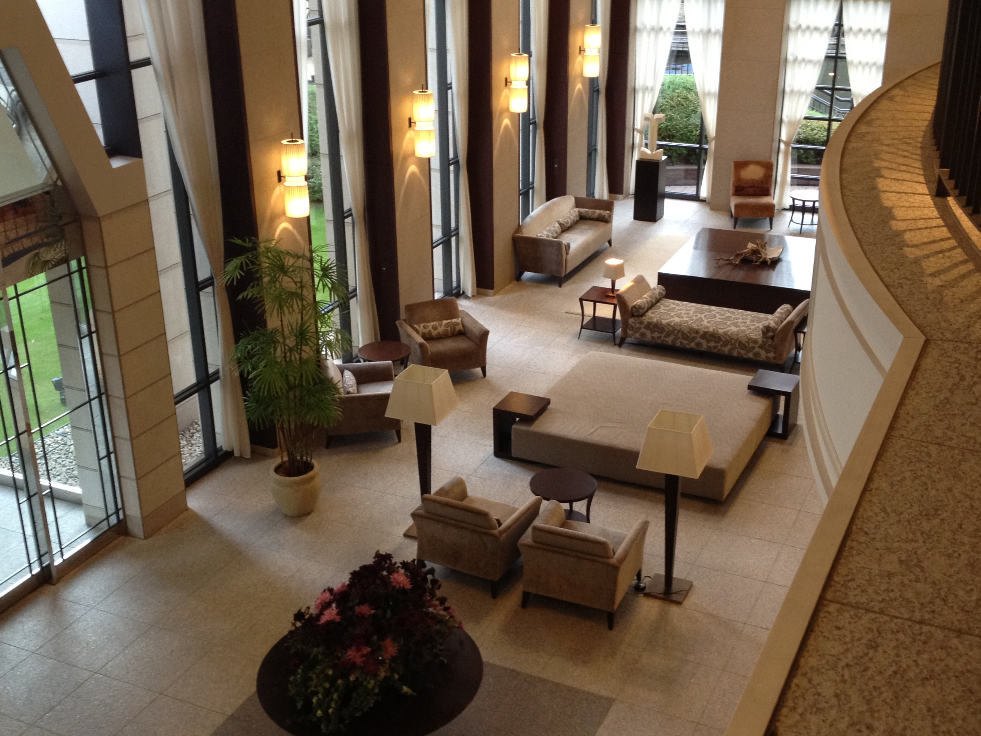 エアタワー・クラブハウス（エントランス棟）内1Fロビー